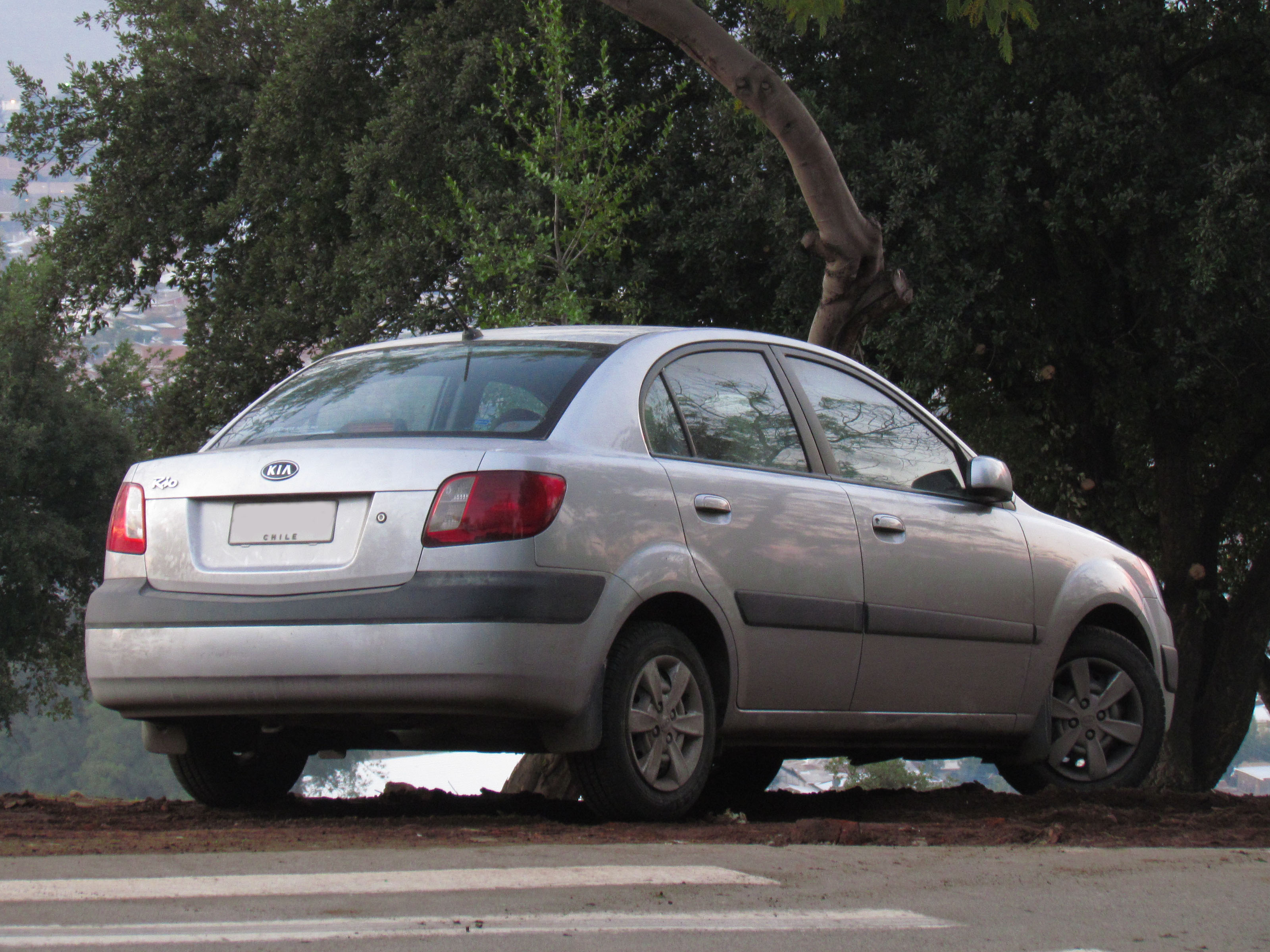 Kia Rio JB 1.4 EX 2008